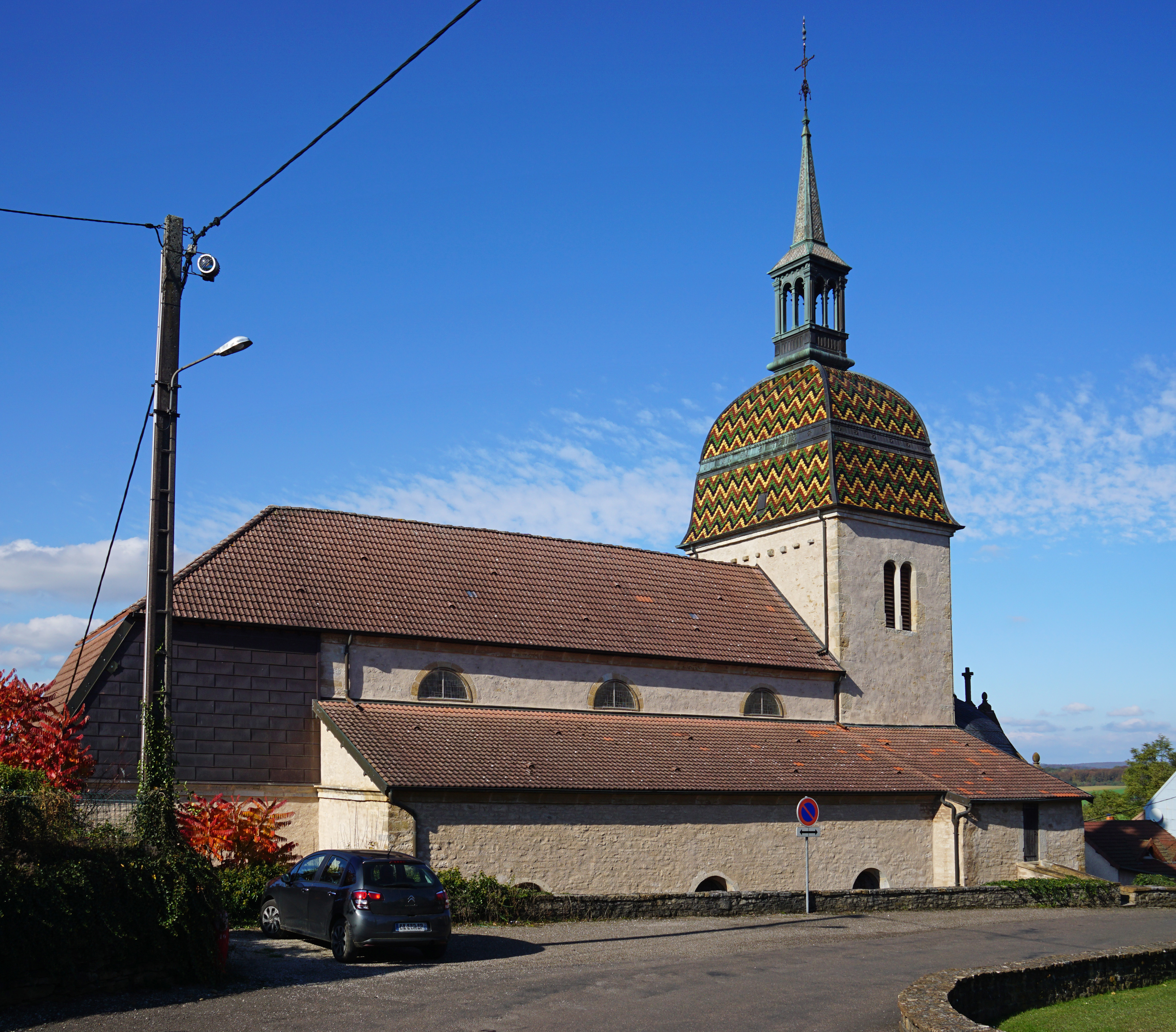 L'église de Rougemont dans le Doubs.